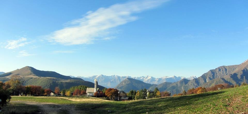 Chiesetta votiva degli Alpini al Pian delle Betulle. Sullo sfondo si vede il dirimpettaio Pian del Giumello. I colori naturali sono quello dell'autunno